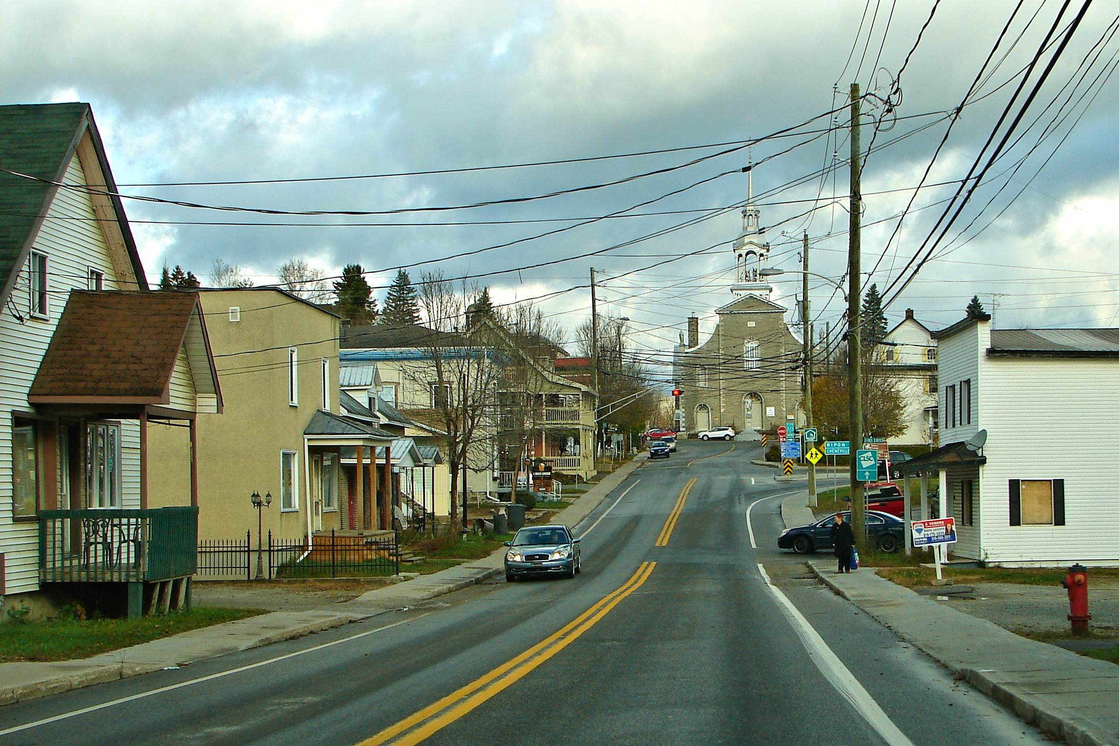 Saint-André-Avellin, Quebec, Canada